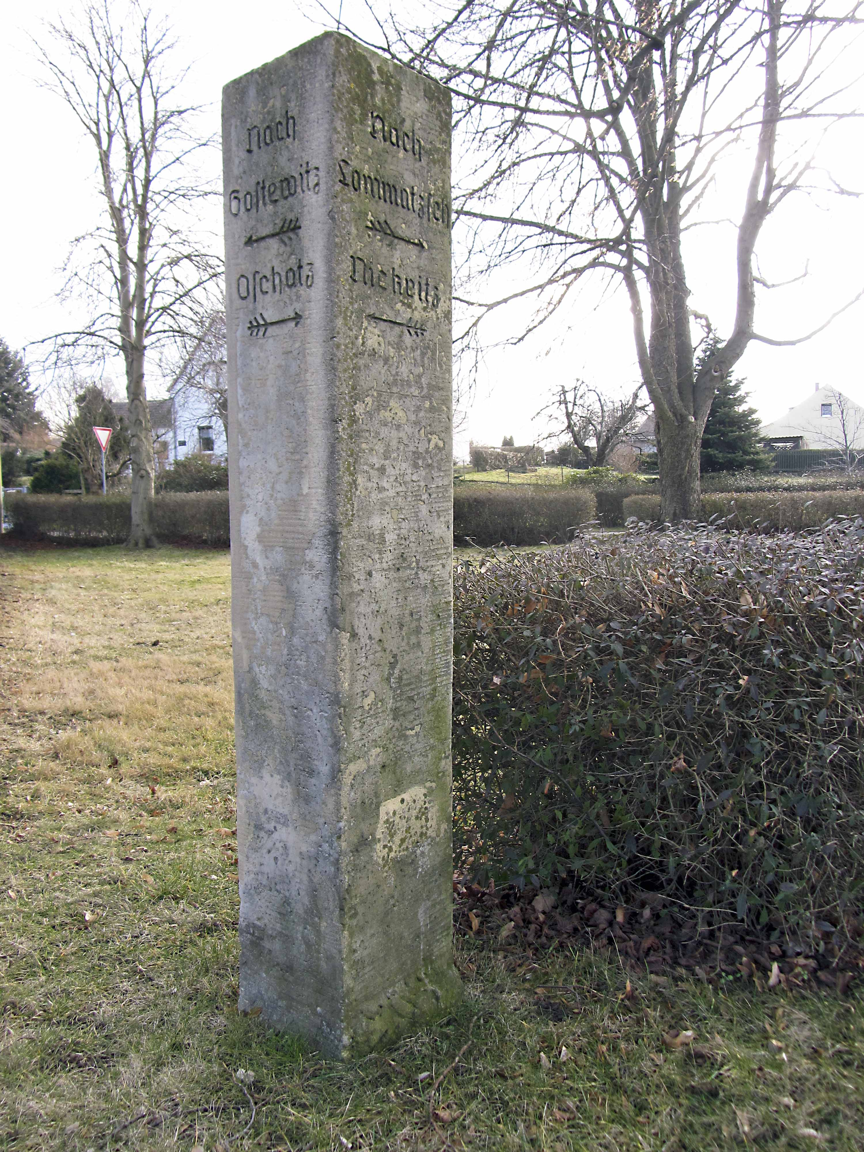 Wegestein, Mehltheuer Straße in Riesa Stt. Böhlen Text: Nach Gostewitz / Oschatz / Nach Lommatzsch / Nickritz / Richtungsweiser